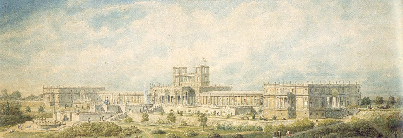 Die Orangerie in Sanssouci, Potsdam